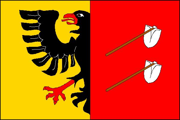 Vlajka města Horní Benešov